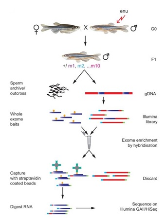 Secuenciacion del exoma del Pez cebra. Para más información consulten en el apartado de "Secuenciación del exoma" o en